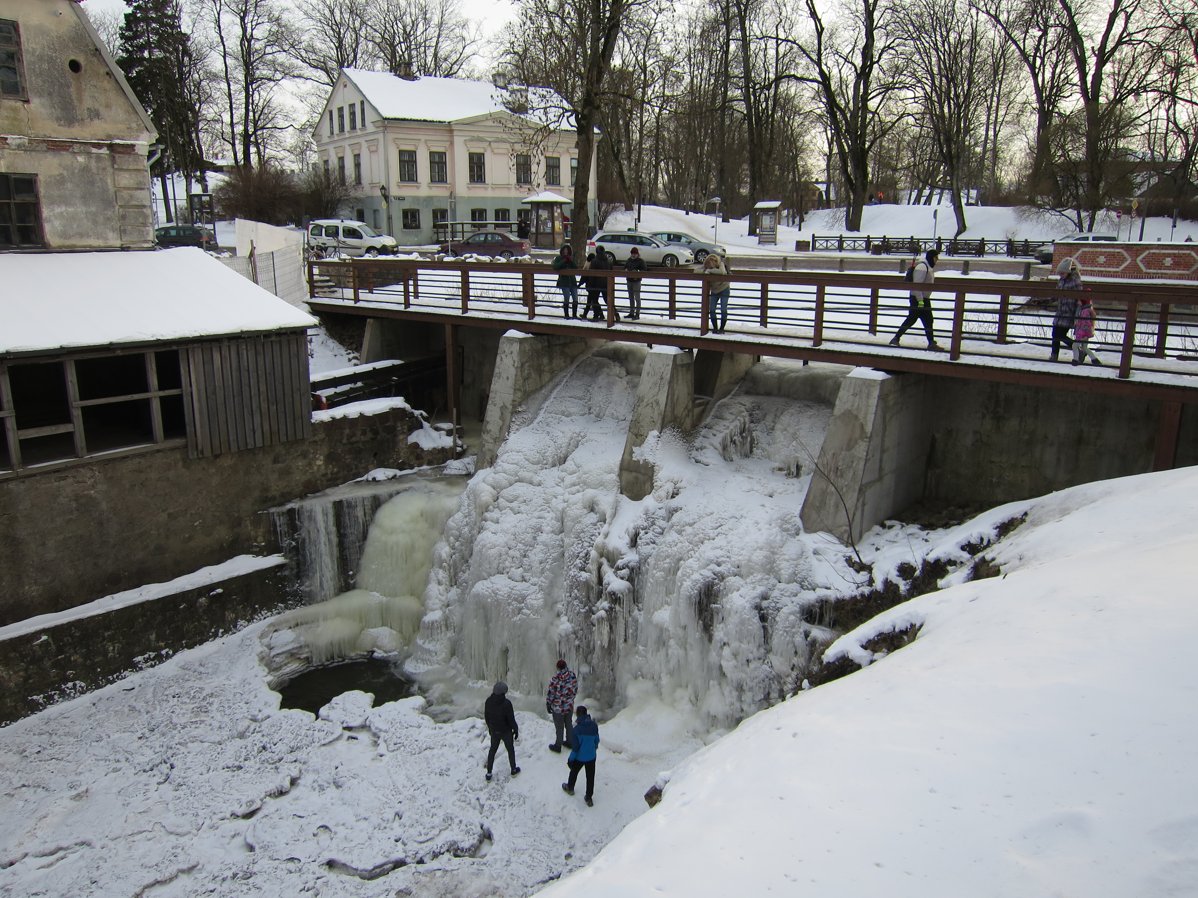 Alekšupītes ūdenskritums ziemā